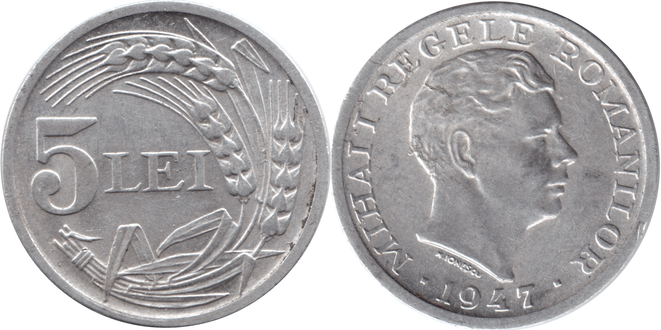 5 lei coin 1947